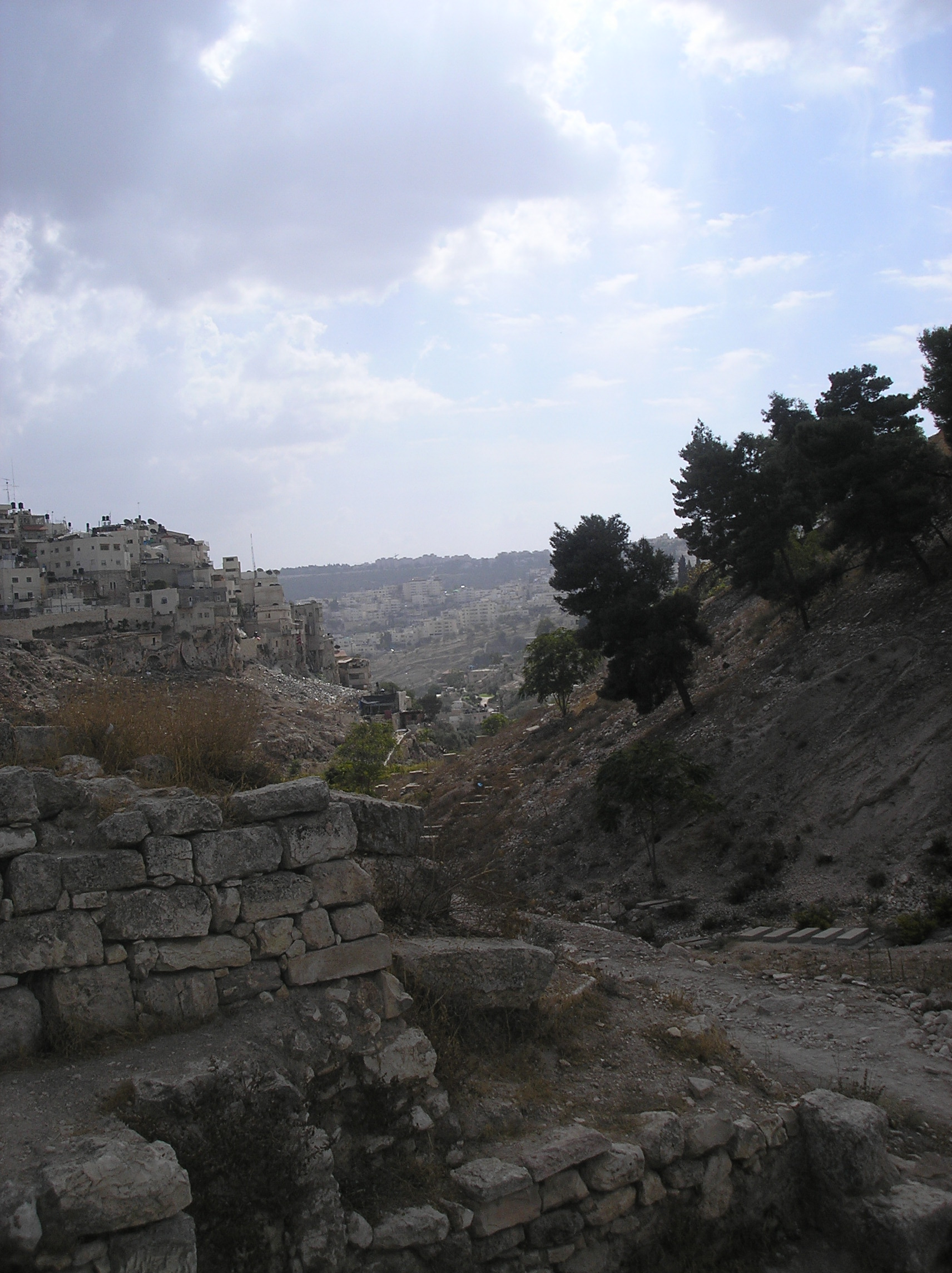 Kidron Valley